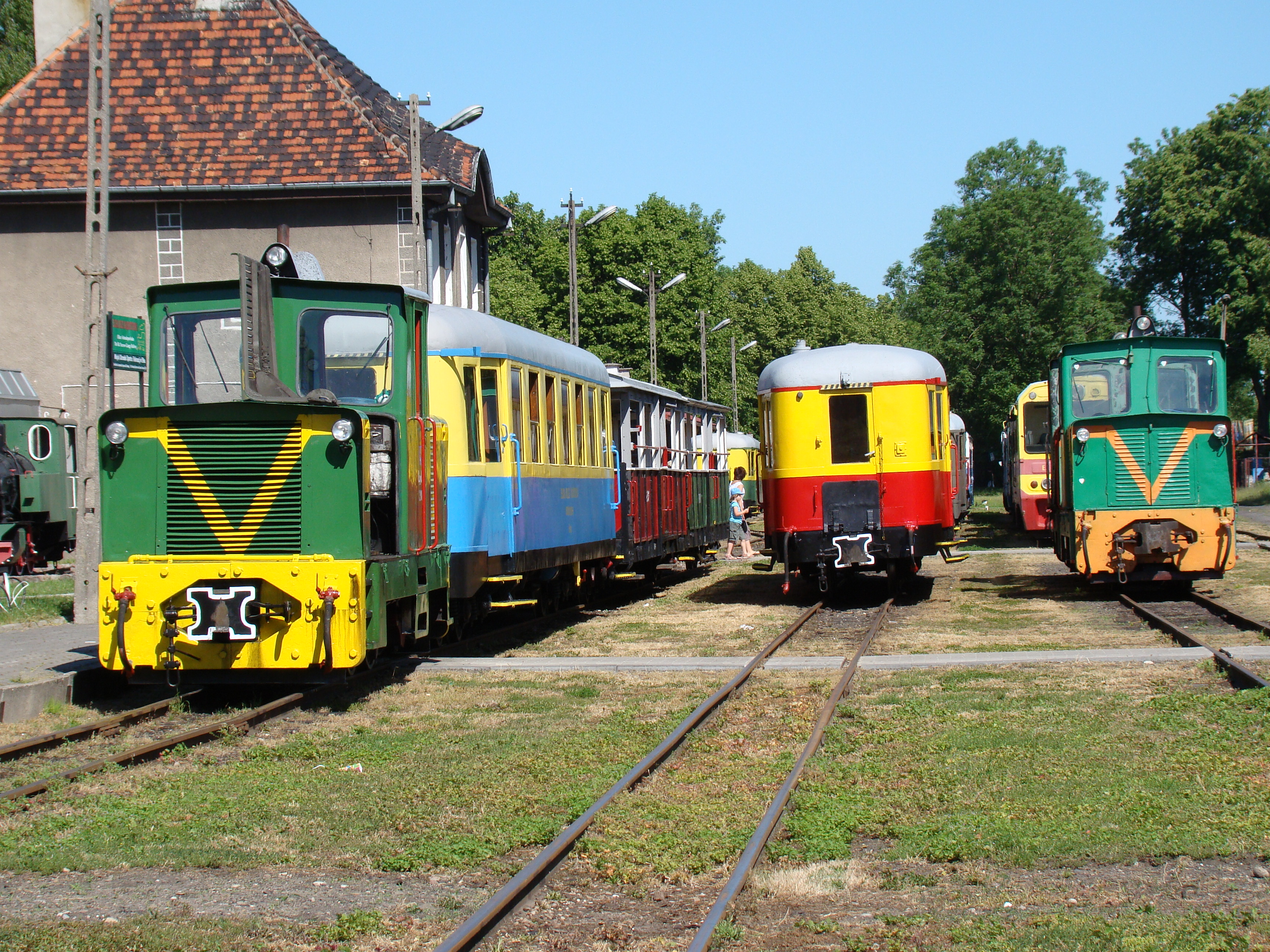 Ełcka kolej dojazdowa-układ przestrzenny